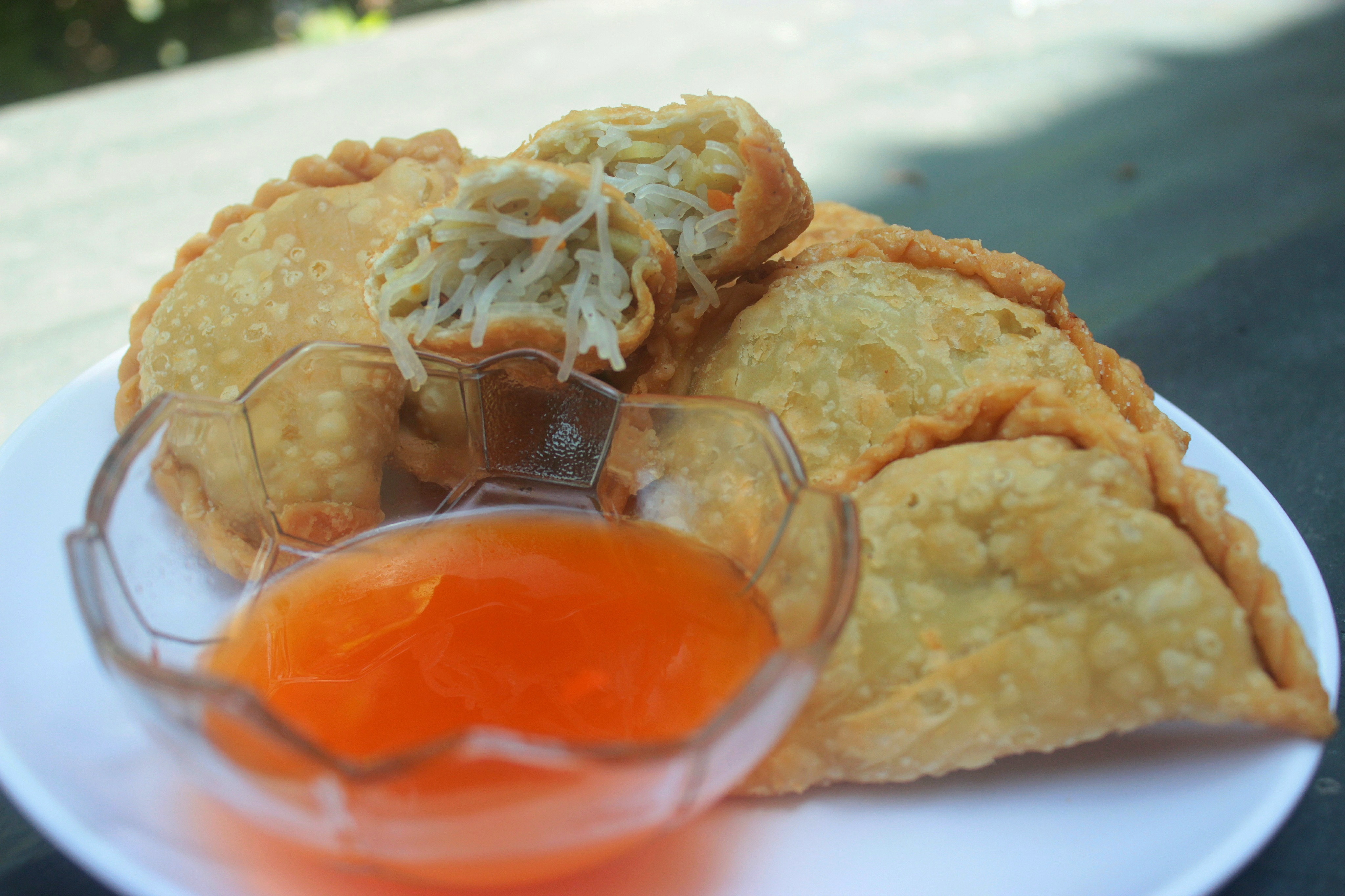 Jalangkote adalah salah satu ragam kuliner khas Makassar, Sulawesi Selatan yang bentuknya mirip dengan kue pastel. Bedanya kue pastel memiliki kulit yang lebih tebal dibandingkan jalangkote. Pastel dimakan bersama dengan cabe rawit sedangkan jalangkote dimakan bersama sambal cair campuran cuka dan cabe.